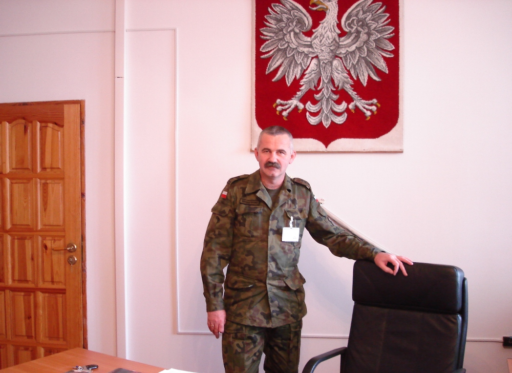 Płk dypl. Ryszard Buchowski dowódca 6BKPanc w latach 2005-2007